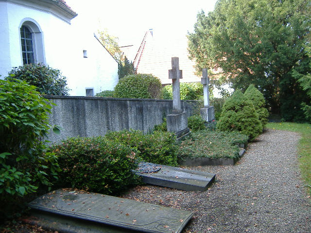 Patrinatsfriedhof Bächingen